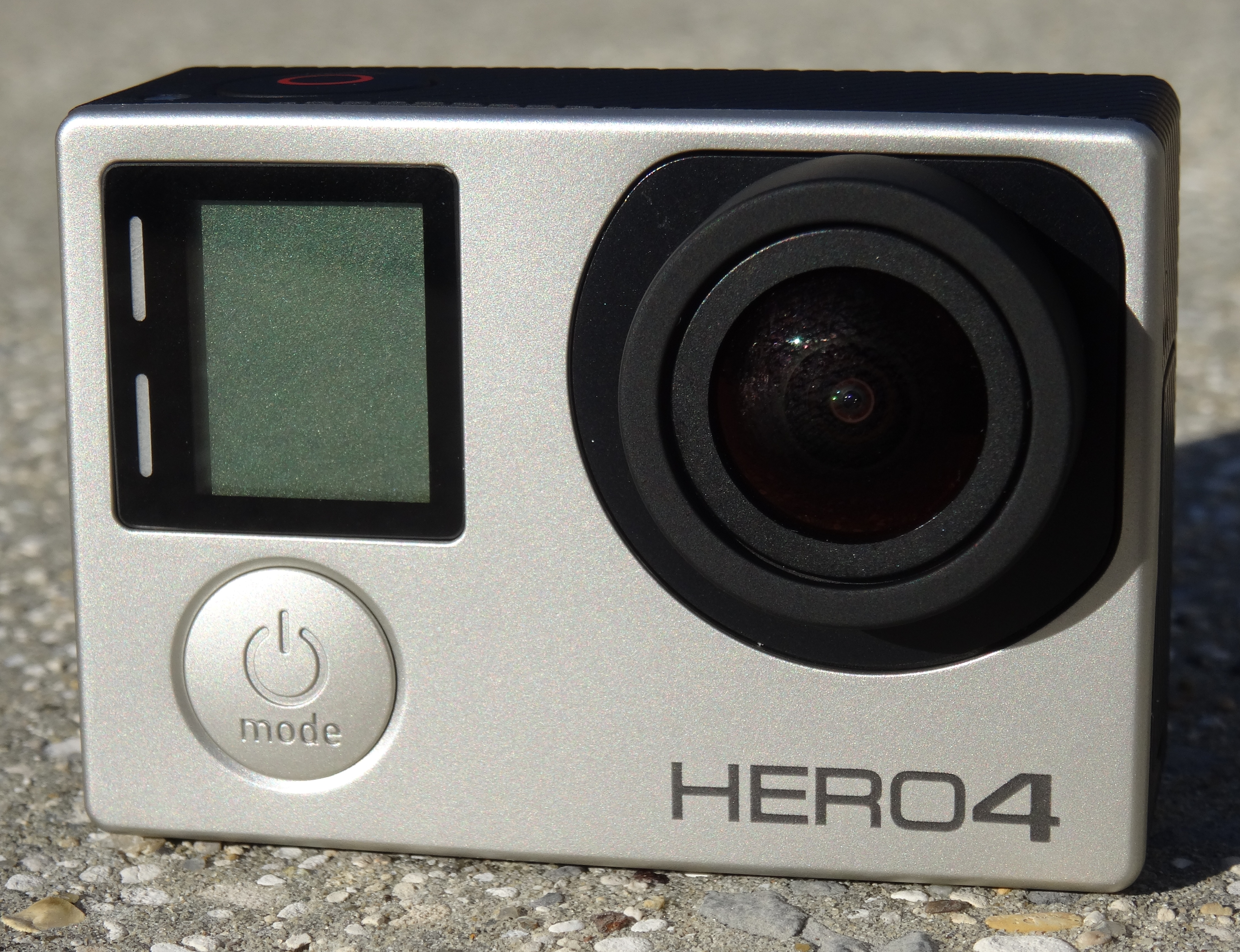 Cyclisme & GoPro : GoPro Hero 4 et accessoires.